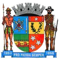 Brasão de armas do município de Ponte Nova, Minas Gerais, Brasil.